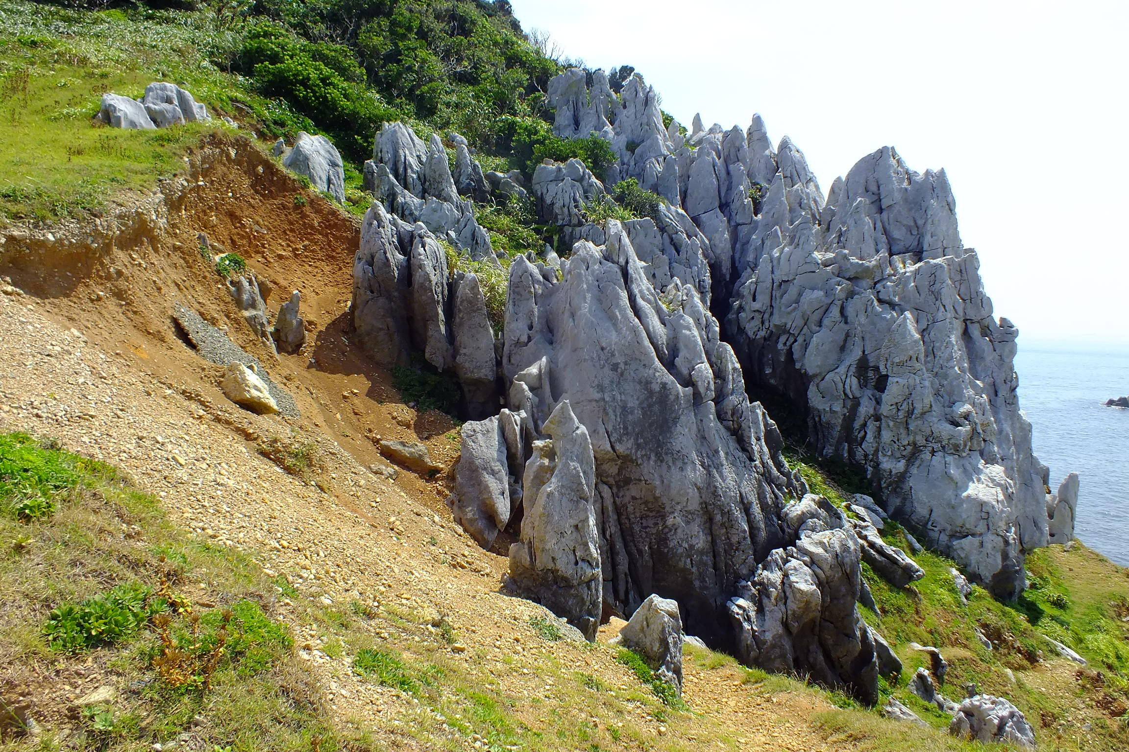 2016-08-05 Kami-shima Island,Karst topography カルスト地形